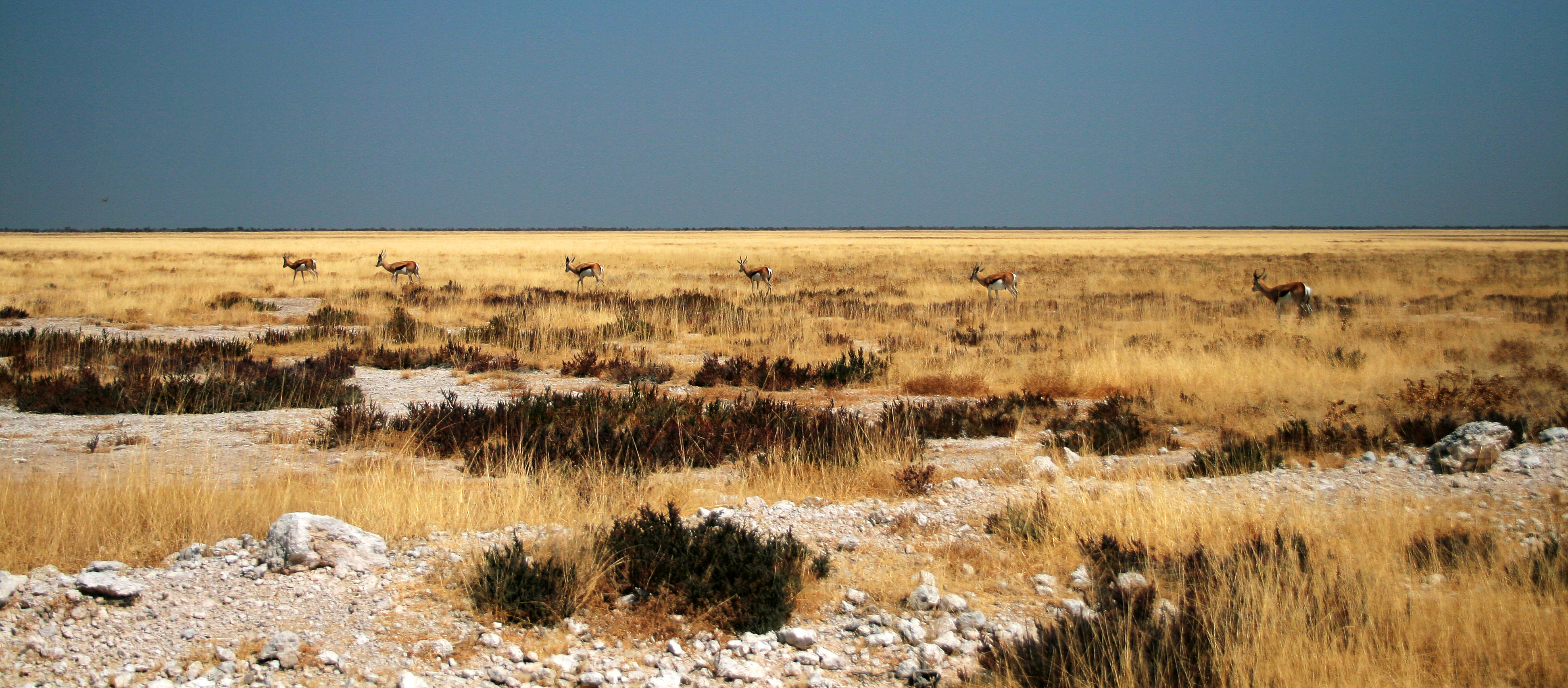 Etosha Pan Springbok